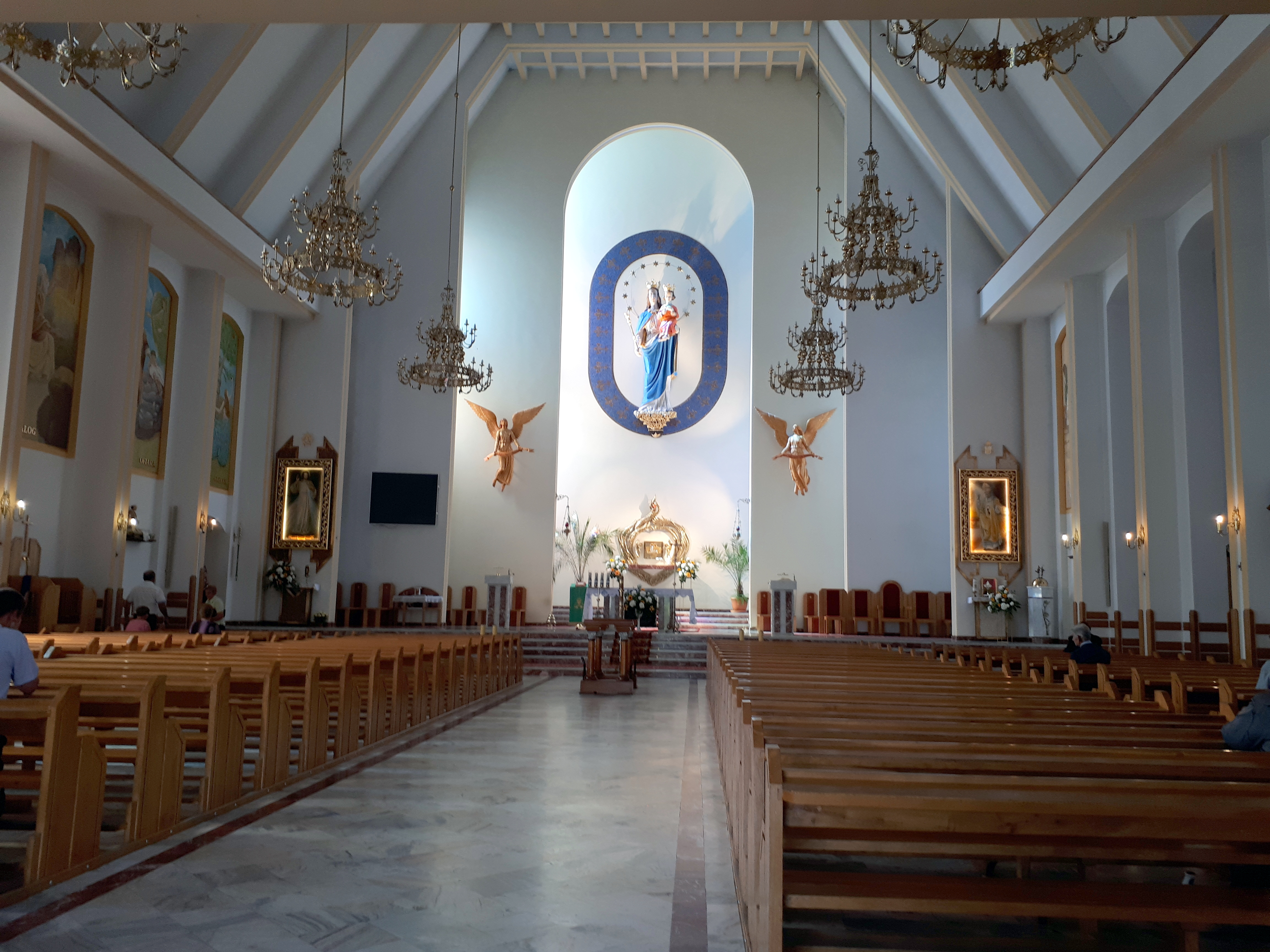 Wnętrze kościoła Matki Bożej Wspomożycielki Wiernych w Łukowicy.